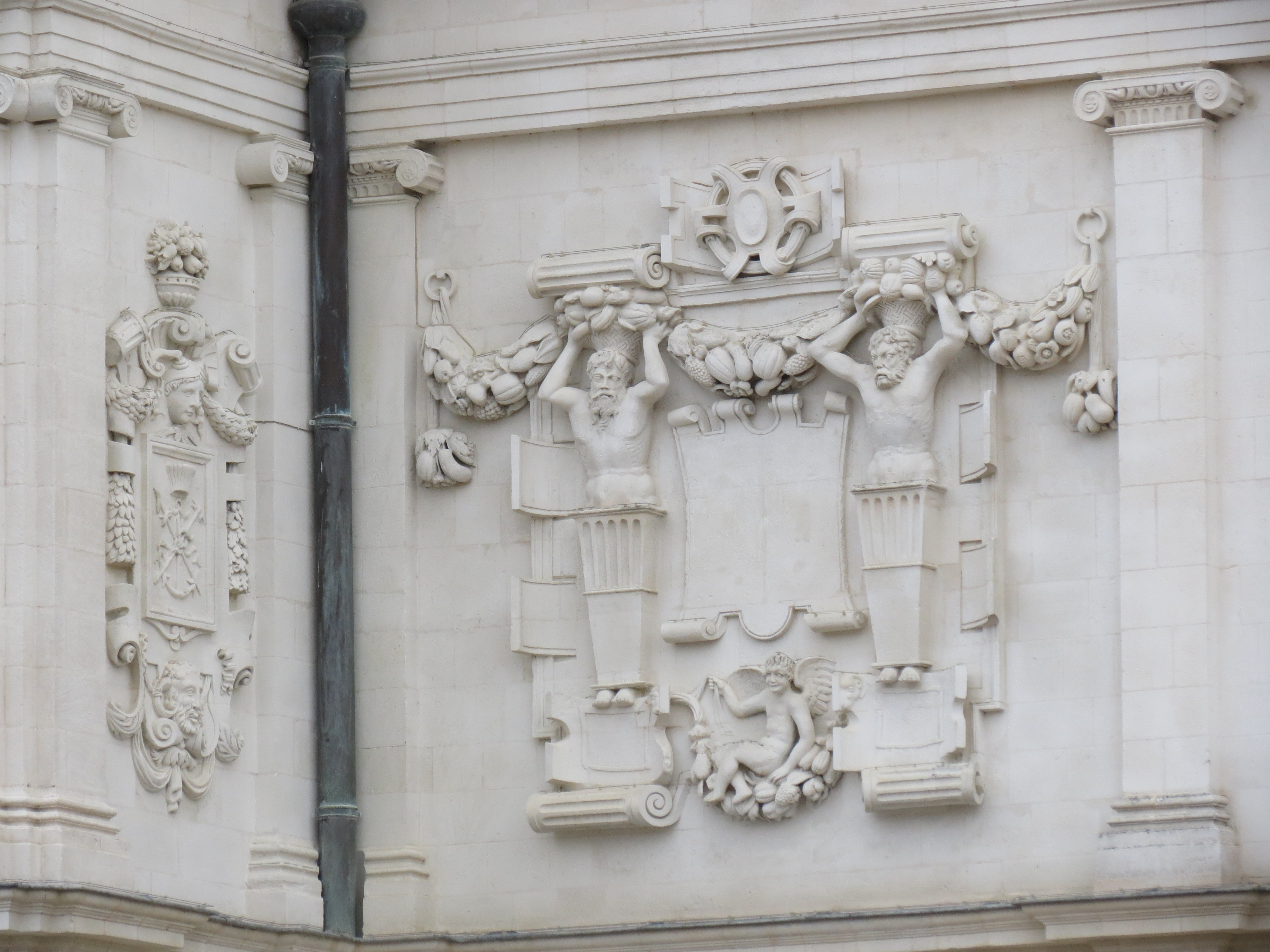 Palais de Justice, Laval, Mayenne, Pays de la Loire.